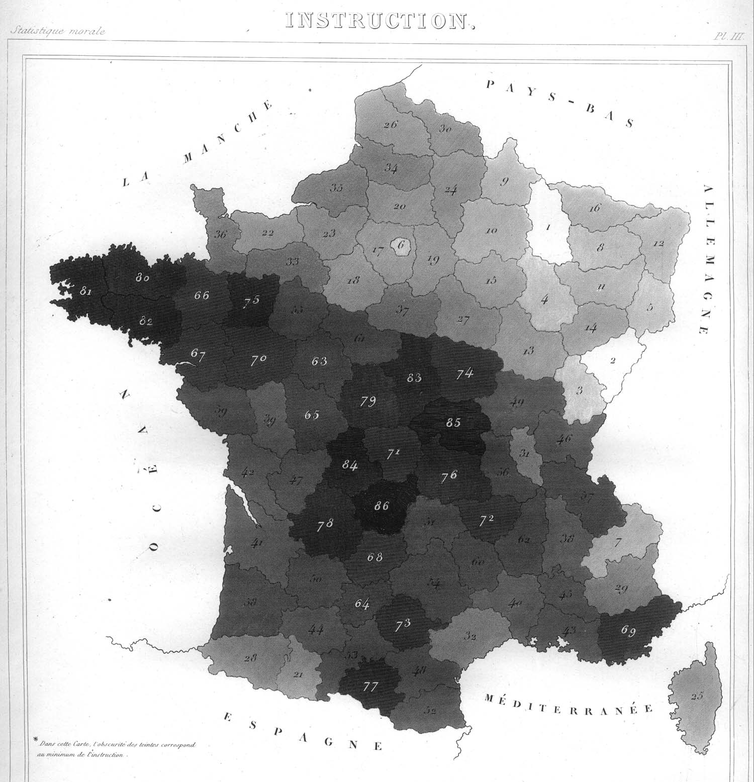 Carte de France de l'instruction, publiée par André-Michel Guerry dans Essai sur la statistique morale de la France (1833)